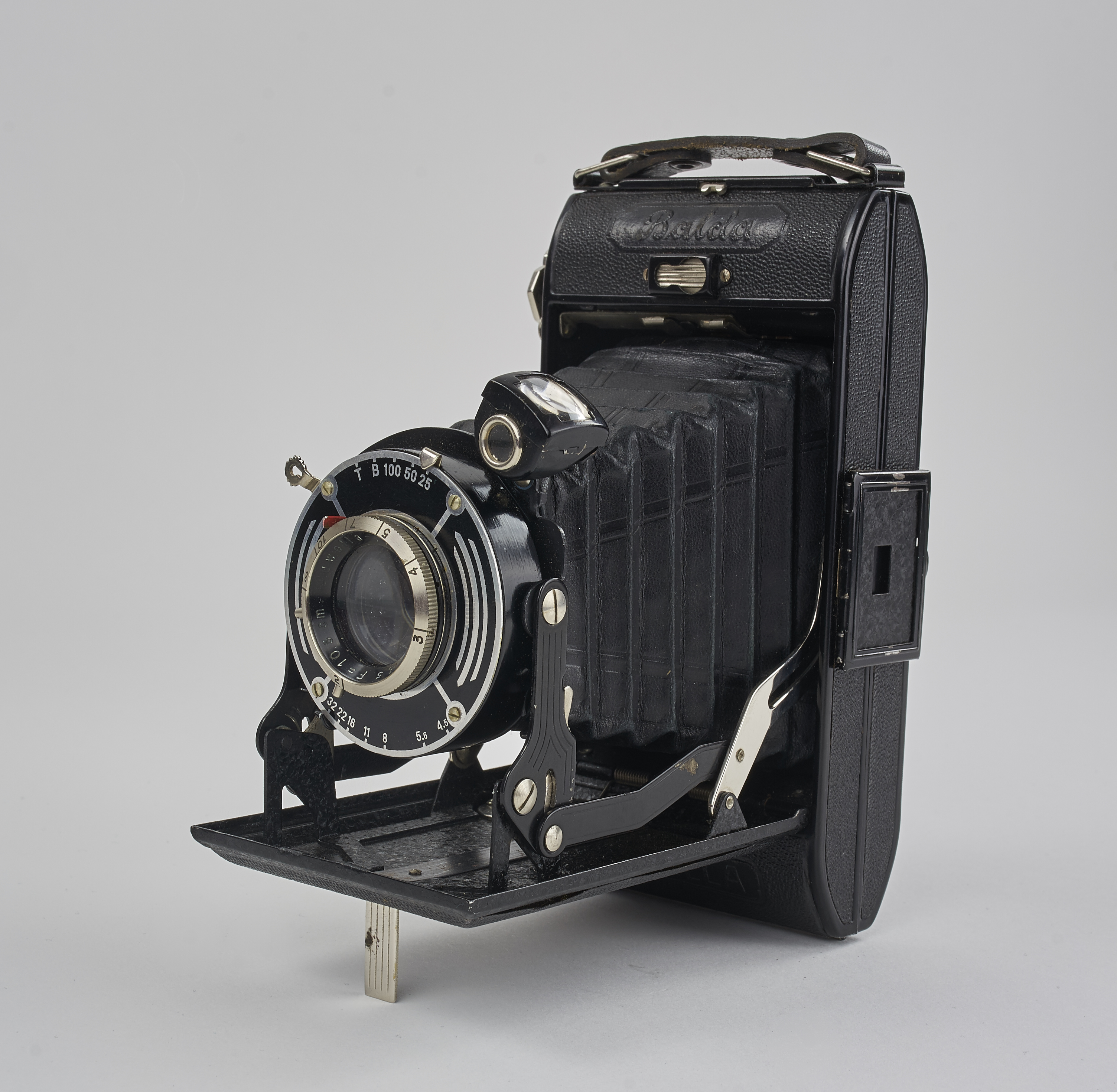 Balda Juwella Mittelformat Klappkamera